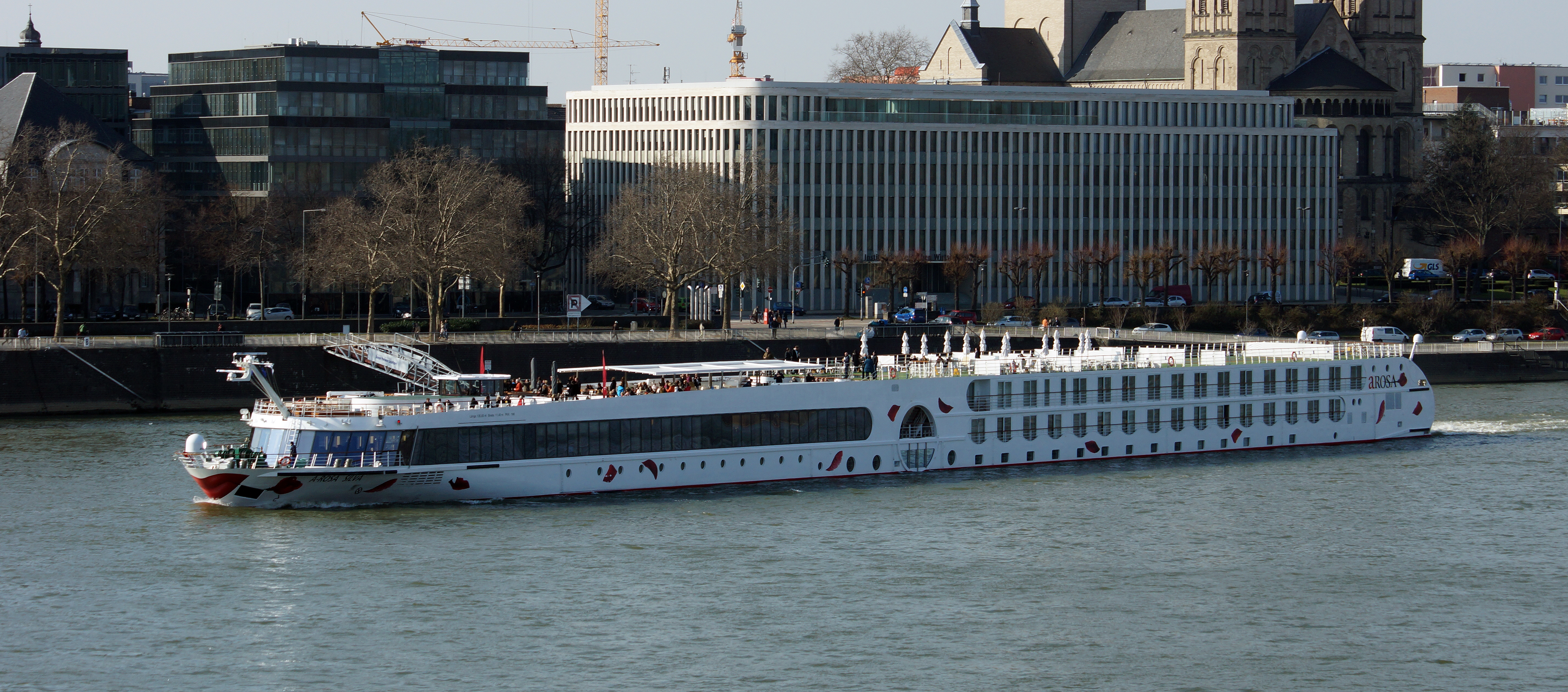 Flusskreuzfahrtschiff A-Rosa Silva in Köln.